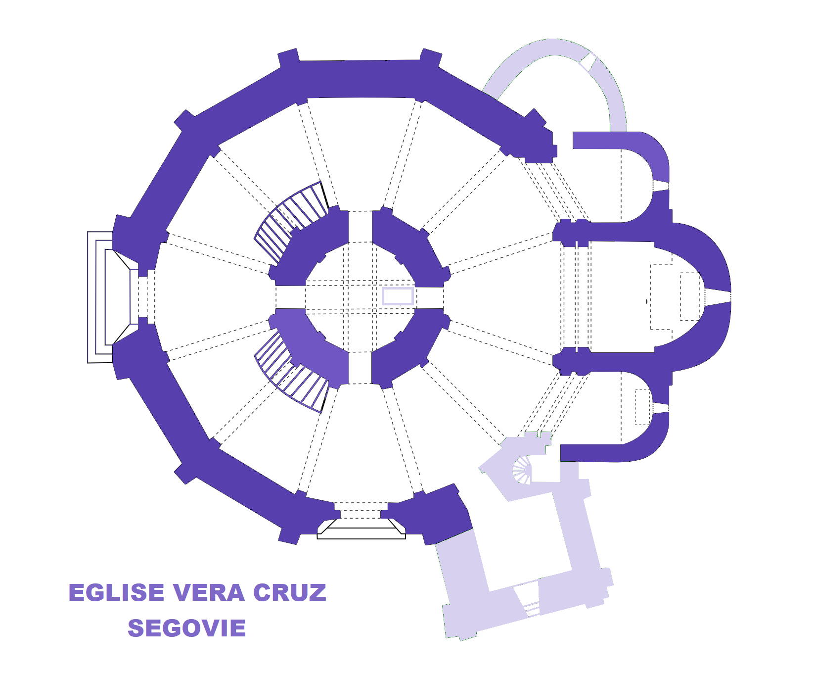 Eglie Vera Cruz de Ségovie, Plan (image Commons modifiée)